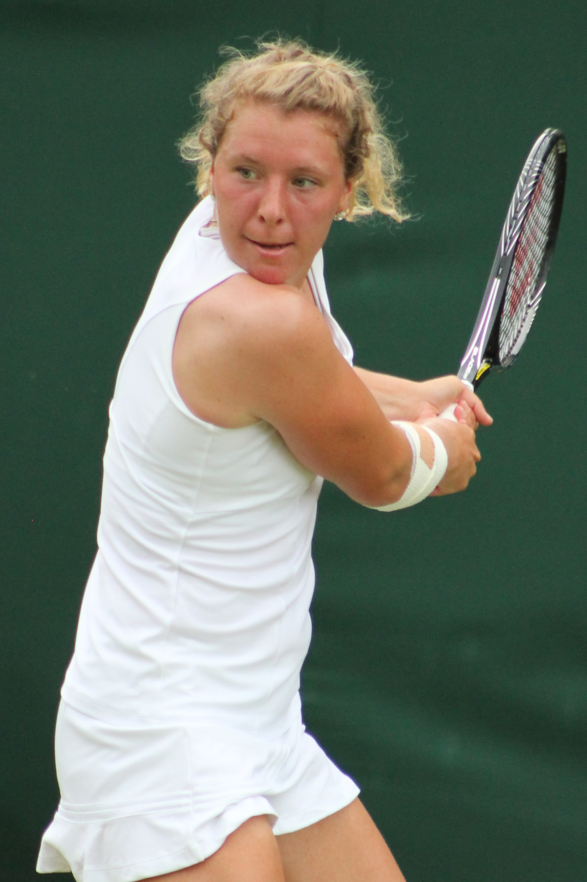 Friedsam WM14 (7)